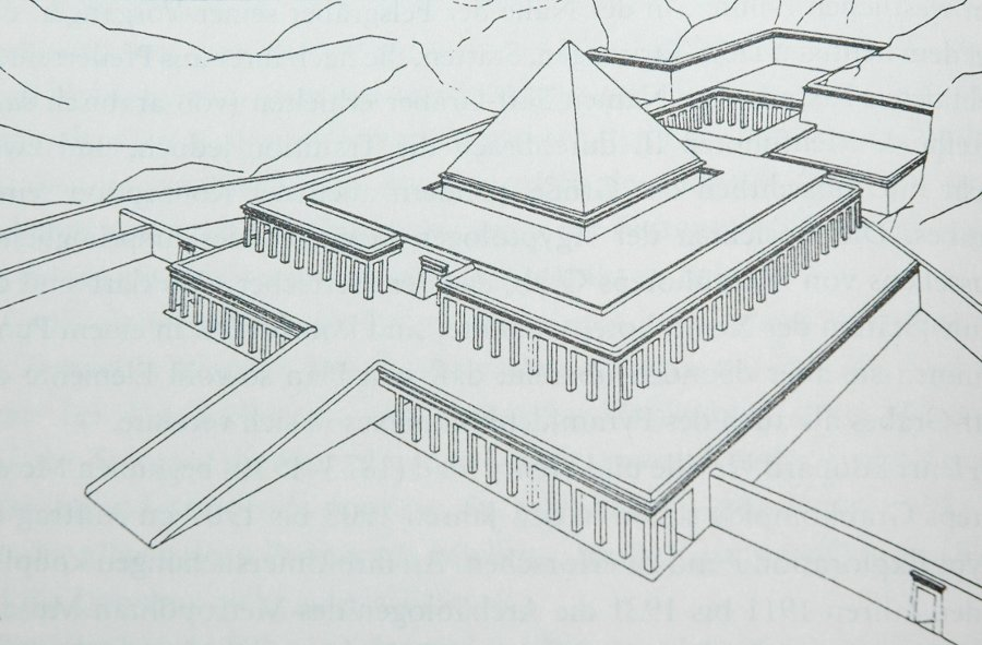 Rekonstruktionszeichnung des Totentempel des Mentuhotep II. in Deir el-Bahari von Henri Édouard Naville (1844-1926)